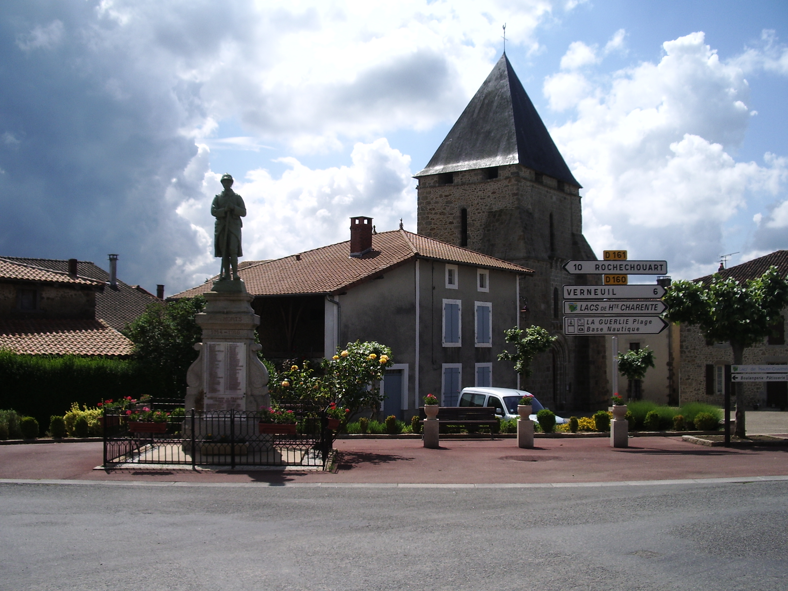 Place centrale de Pressignac (Charente, France)